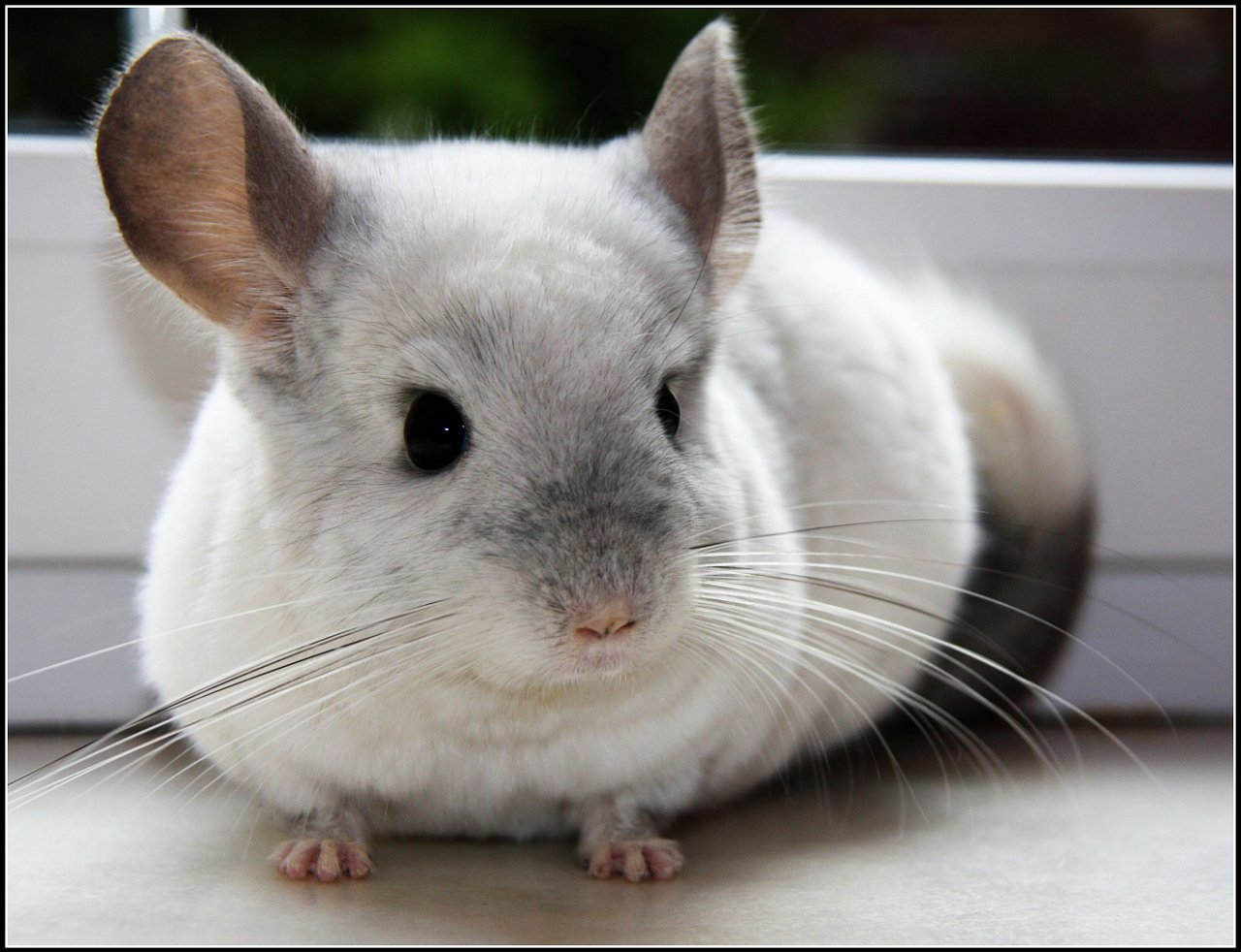 Фифон